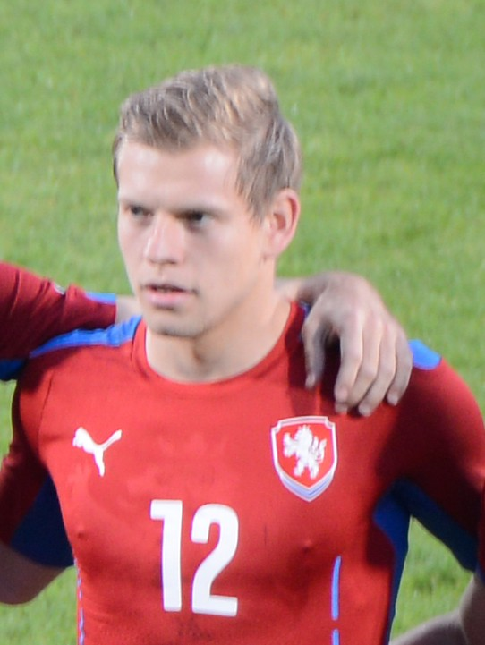 Mezinárodní fotbalový zápas Česko - Rakousko v Olomouce